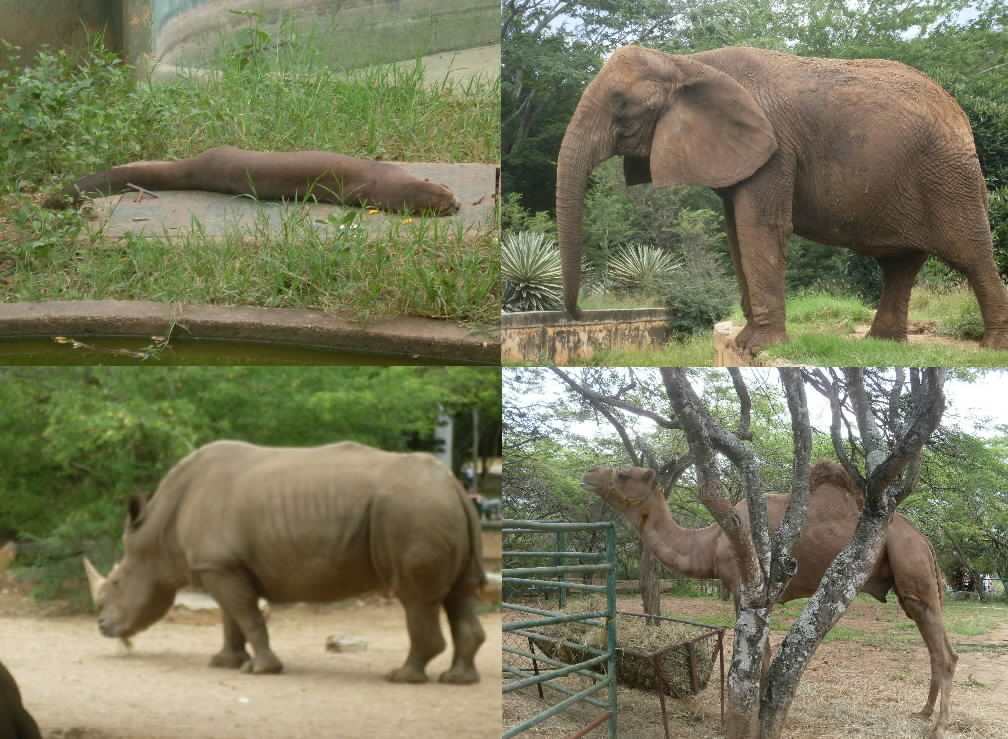 Parque Zoológico y Botánico Bararida, Barquisimeto estado Lara - Venezuela